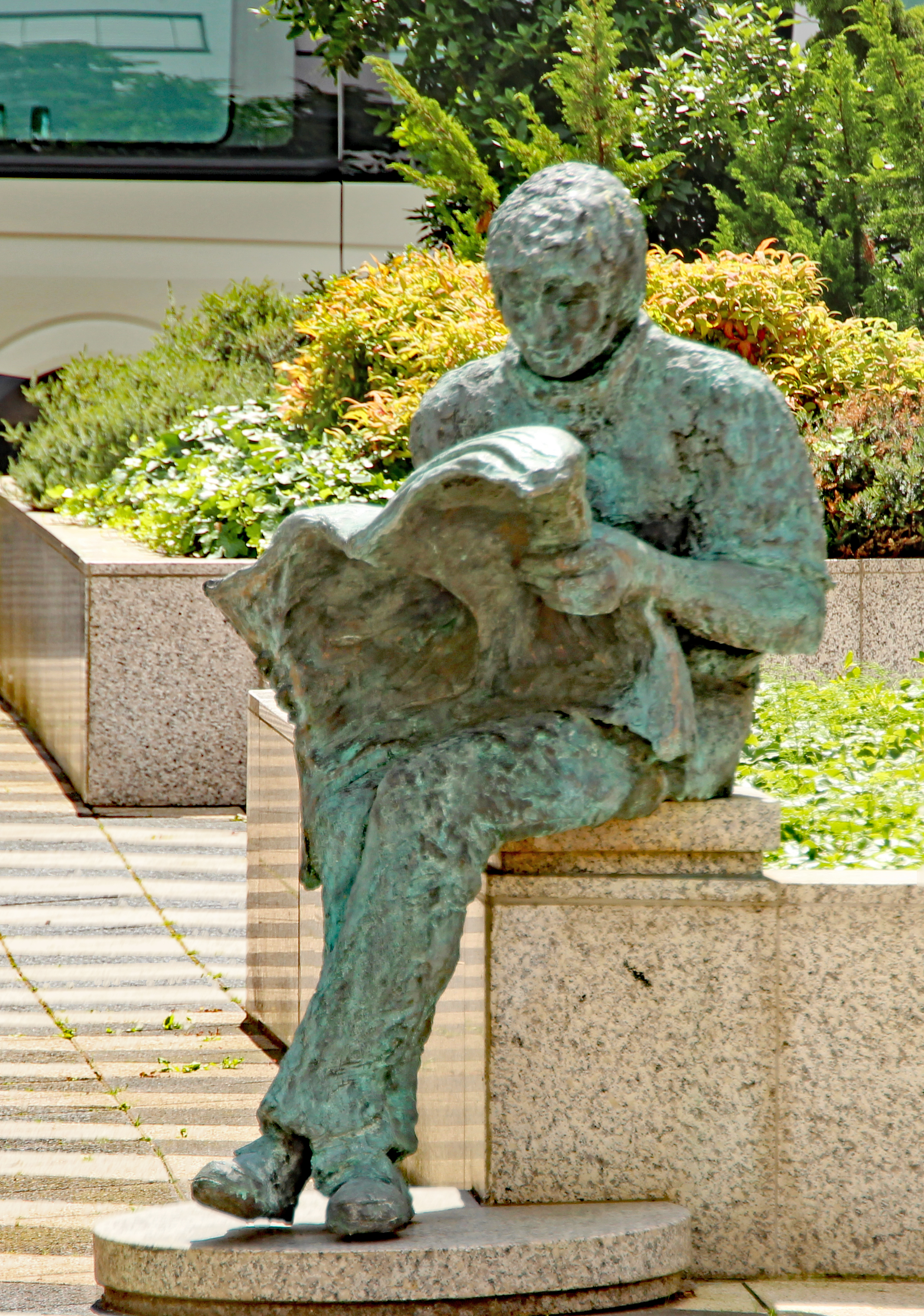 Bildinhalt: Skulptur eines Zeitungslesers im Innenhof der Saarbrücker Zeitung Aufnahmeort: Saarbrücken, Deutschland